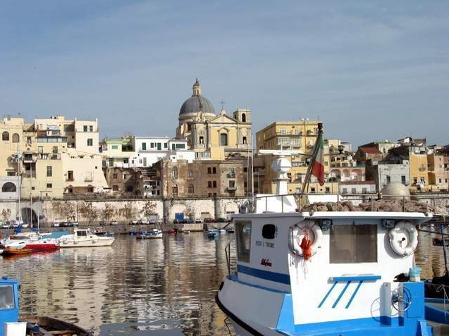 Veduta dal porto di Torre Annunziata